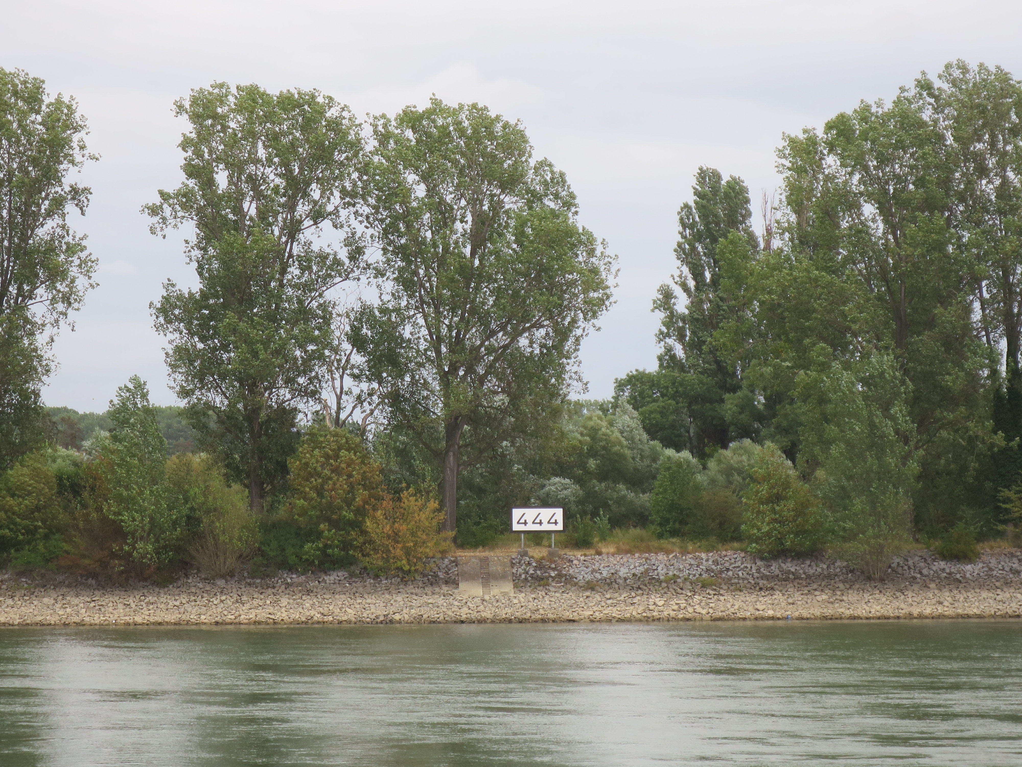 Rhein-Stromkilometer 444, Worms